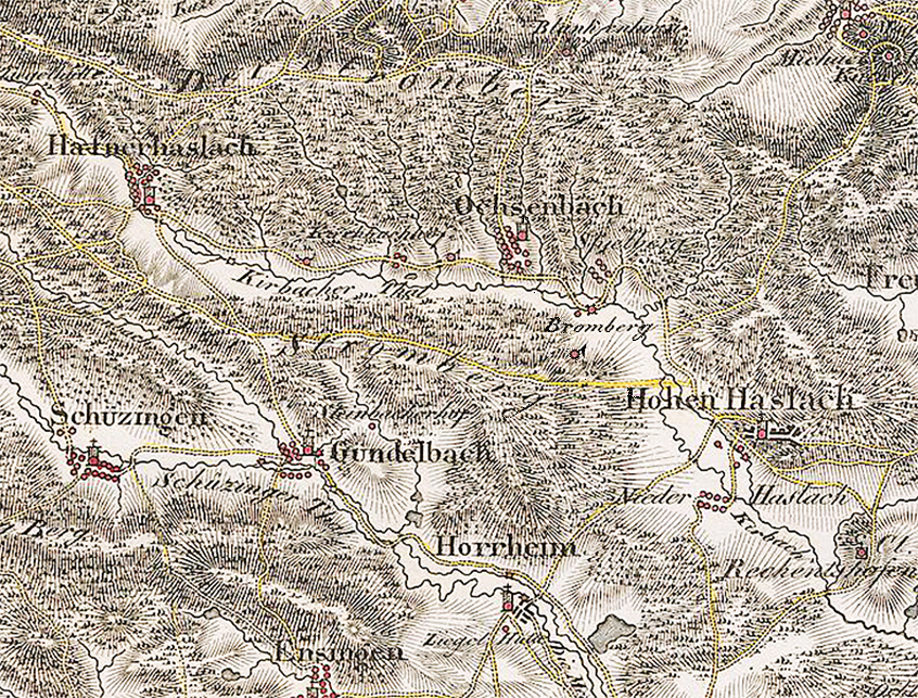 Bromberg (Burgruine und Mühle) im Kirbachtal auf einem Ausschnitt von Bohnenbergers Charte von Schwaben, Blatt 4 [Ludwigsburg], um 1808. 1824 wurde die baufällige Burg abgetragen.